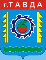 На гербе изображены: шестерня - символ машиностроения, реторта - химической промышленности, пилы-ели - лесное богатство, волны - символ реки Тавды.